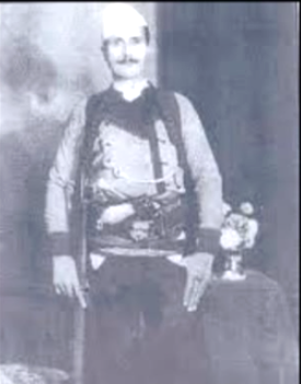 Bislim Bajgora, luftëtar